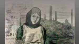 Félicien Rops, La grève, héliogravure, vers 1875 représentation de Marie Mineur